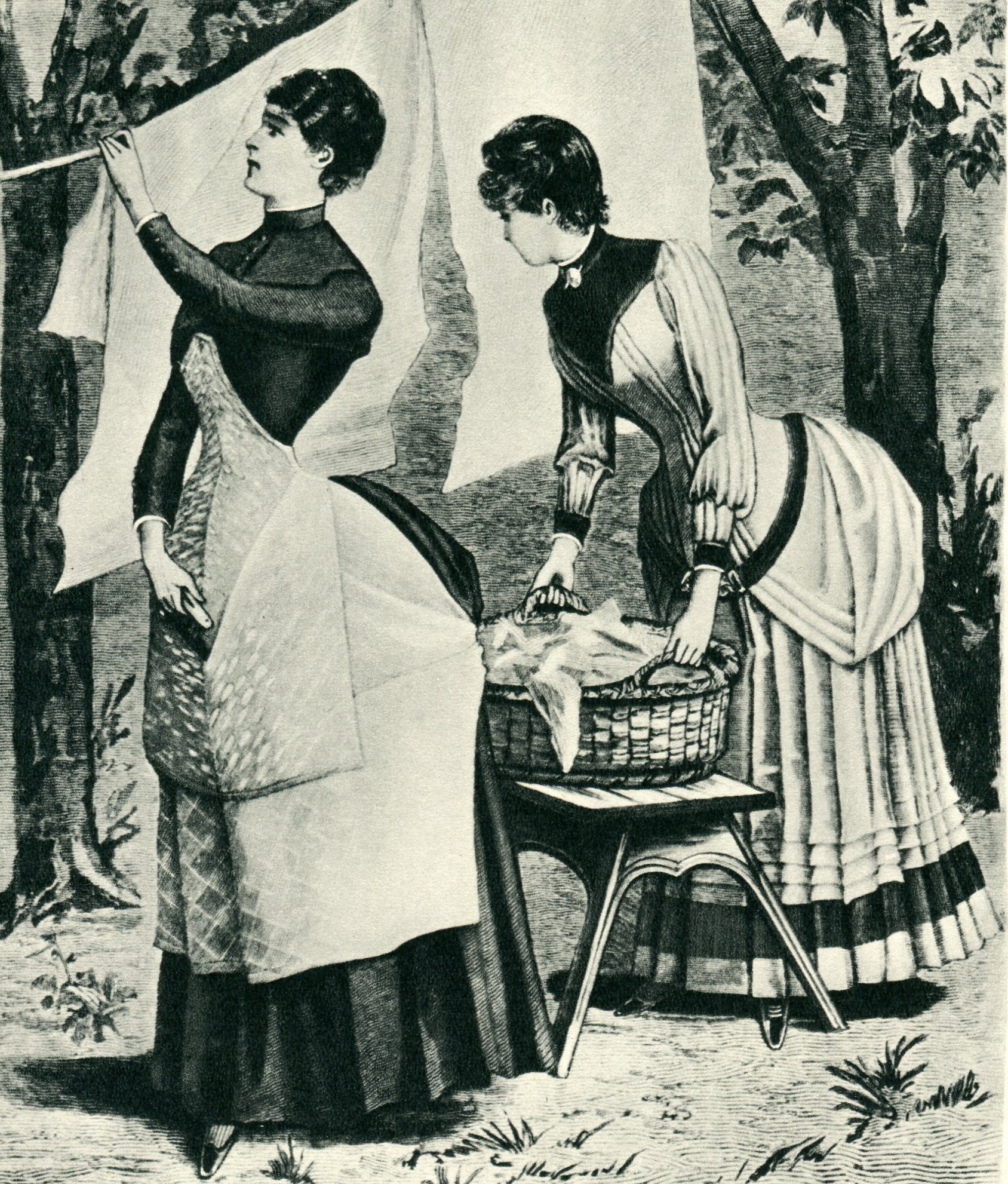 Klammerbeutel, hier an der Schürze angebracht